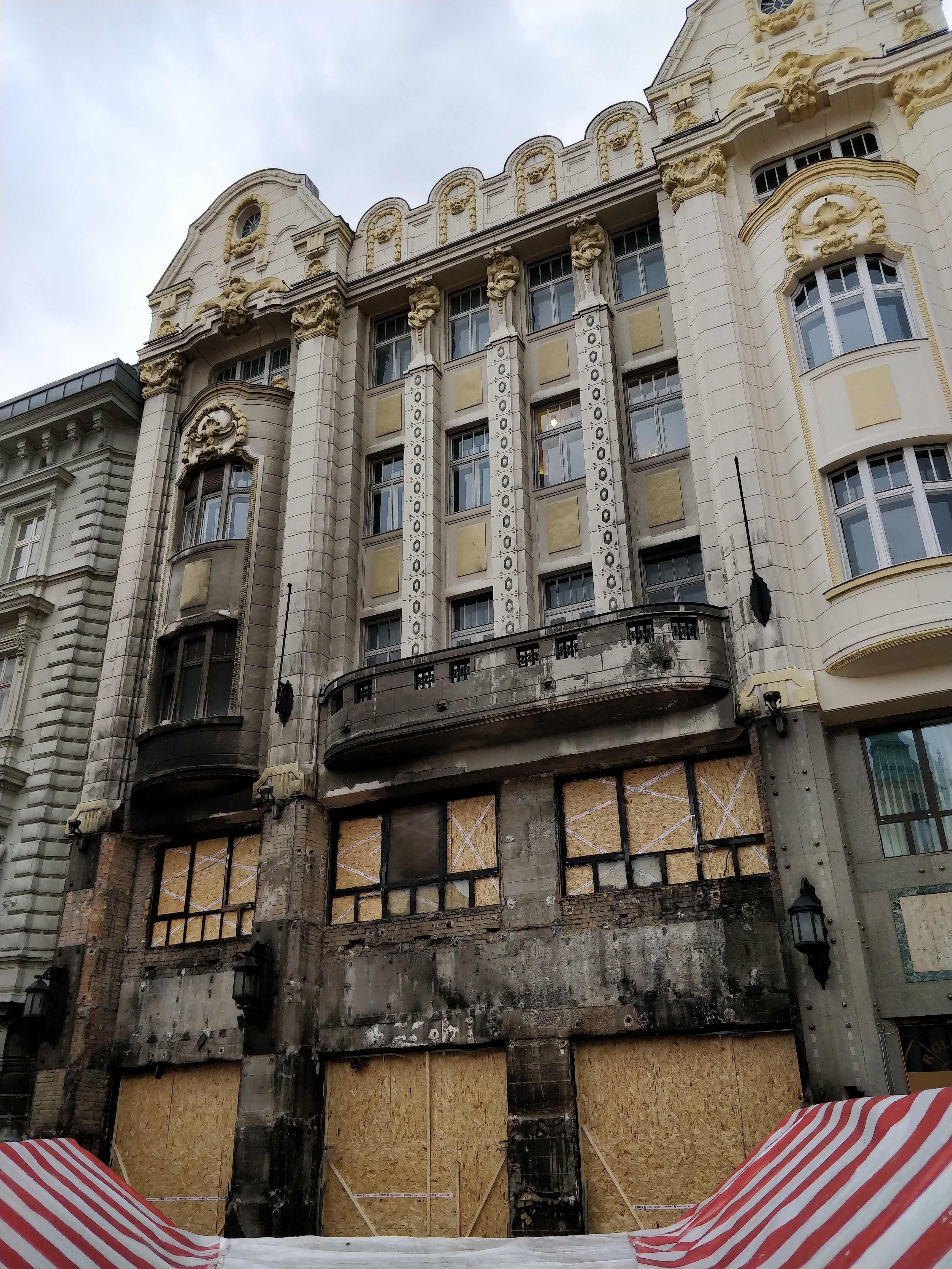 Roland Palace in Bratislava after 2018 Christmas Market fire